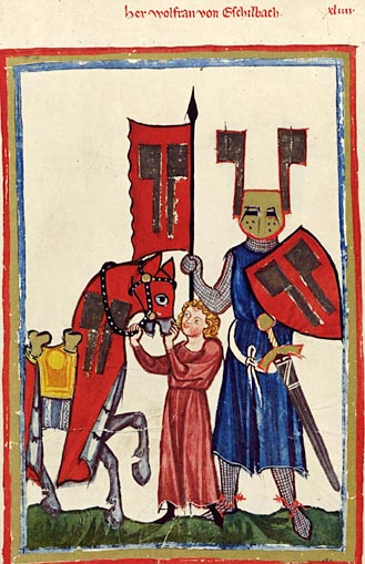 Codex Manesse, UB Heidelberg, Cod. Pal. germ. 848, fol. 149v: Herr Wolfram von Eschenbach